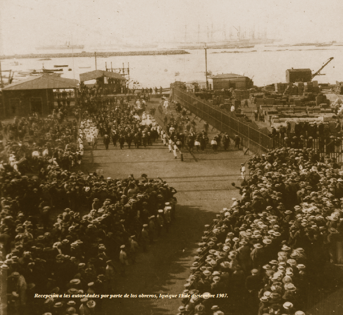 Imagen extraída del libro La masacre de la escuela Santa María de Iquique. Recepción a las autoridades por parte de los obreros, Iquique 19 de diciembre 1907.